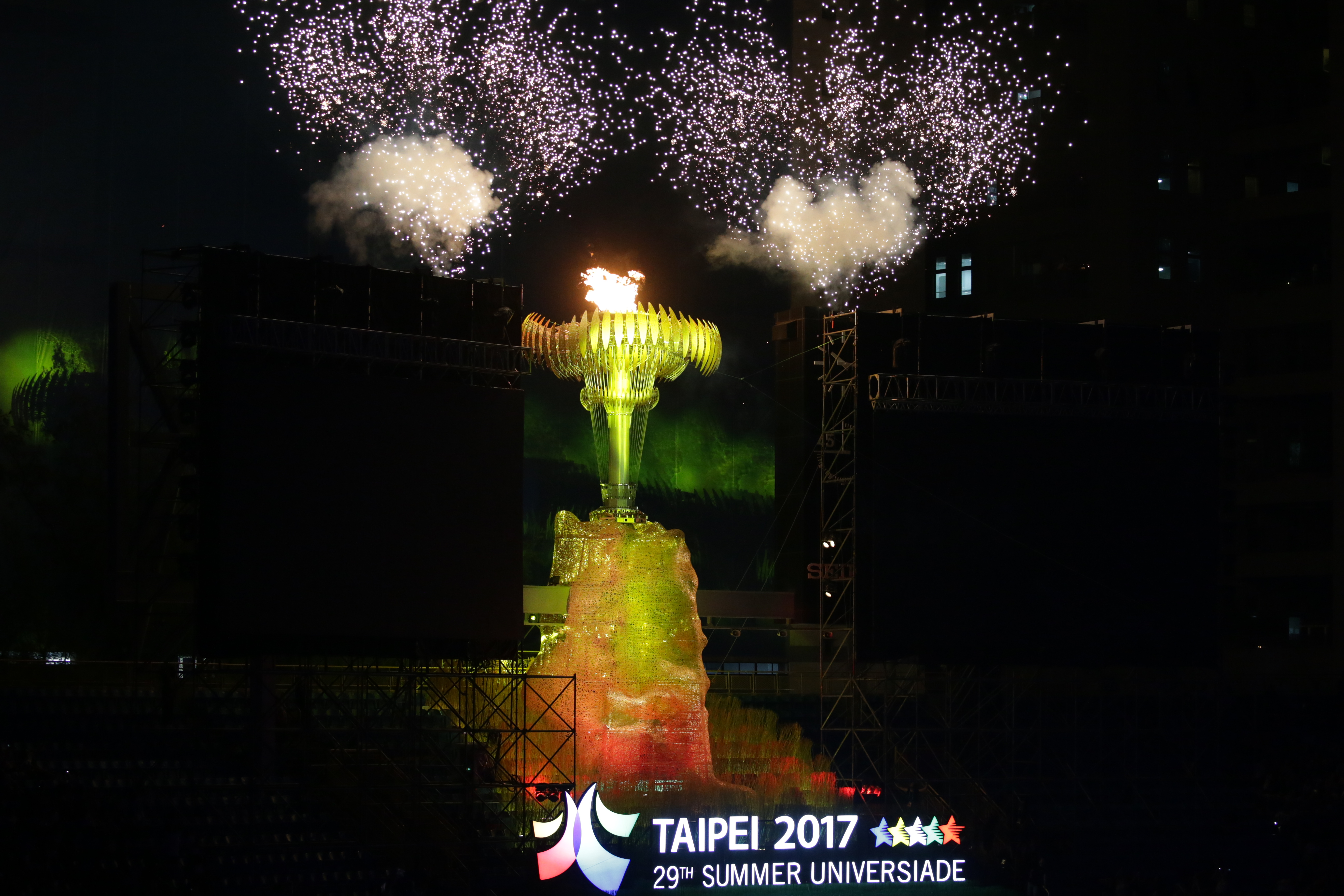 08.19 2017年世界大學運動會開幕典禮表演節目